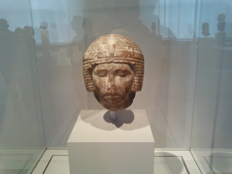 Tête d'une statue royale trouvée à Abousir - Ve dynastie égyptienne / Kopf königlicher Statue, der in Abusir gefunden ist - 5. ägyptische Dynastie